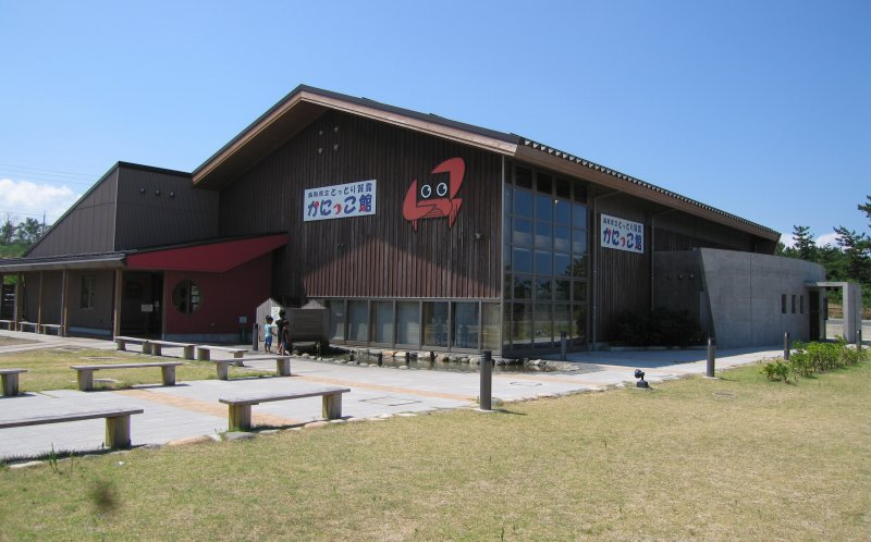 鳥取県立とっとり賀露かにっこ館外観